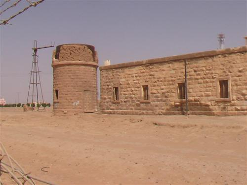 بئر بن هرماس